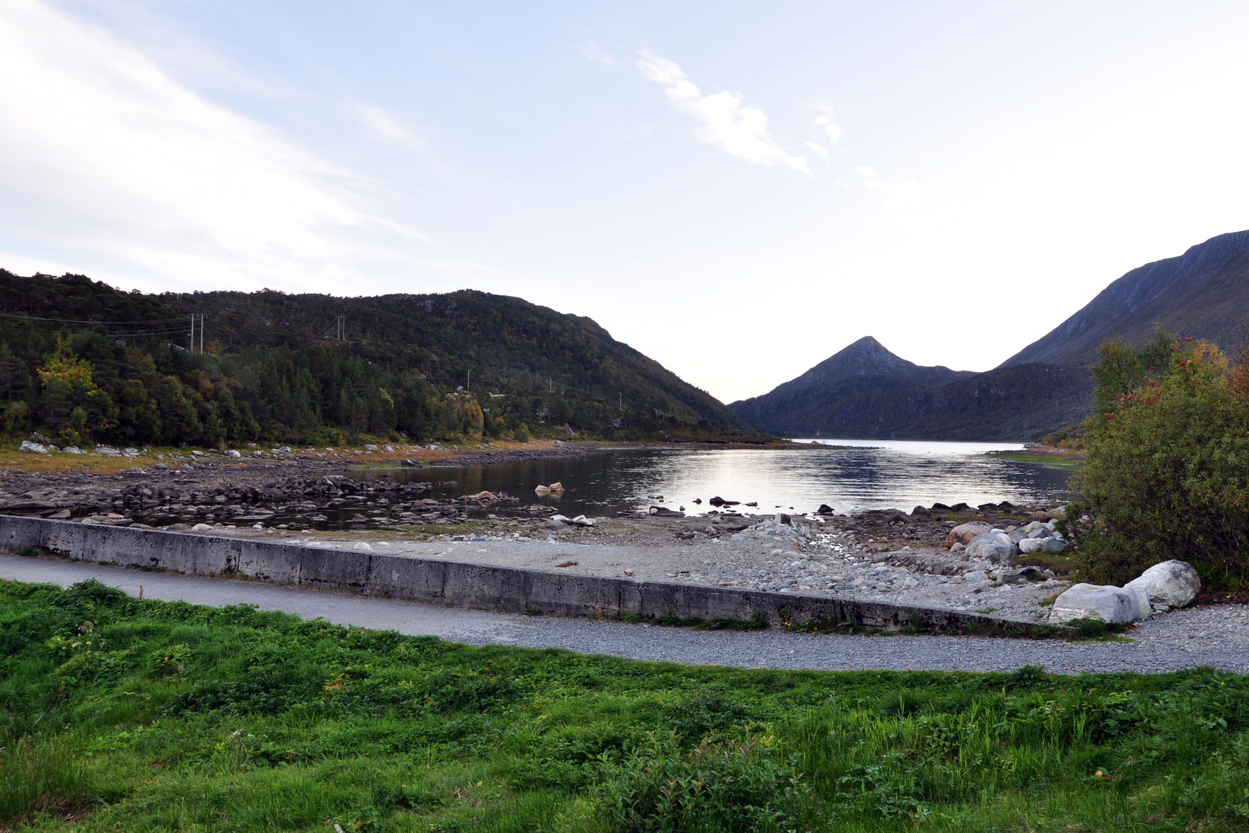 Utsikt utover Synnalandsvatnet fra enden ved dammen.